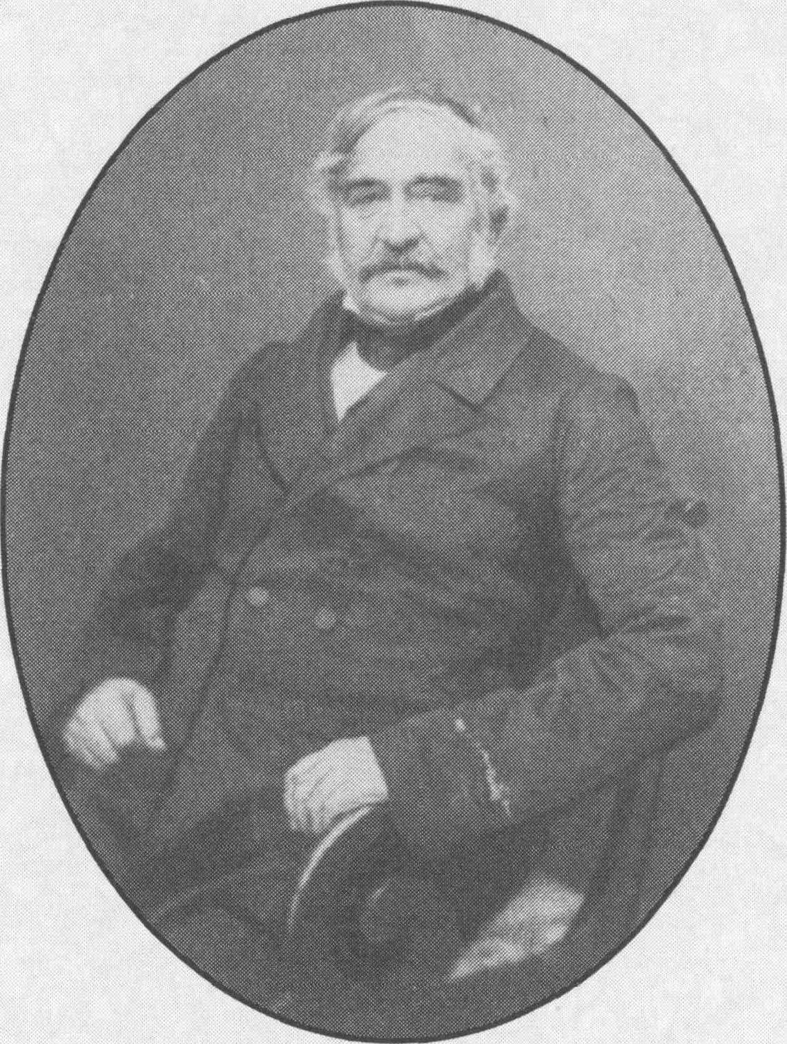 Edward Wańkowicz, ojciec Anny Woyniłłowicz, dziad Edwarda Woyniłłowicza